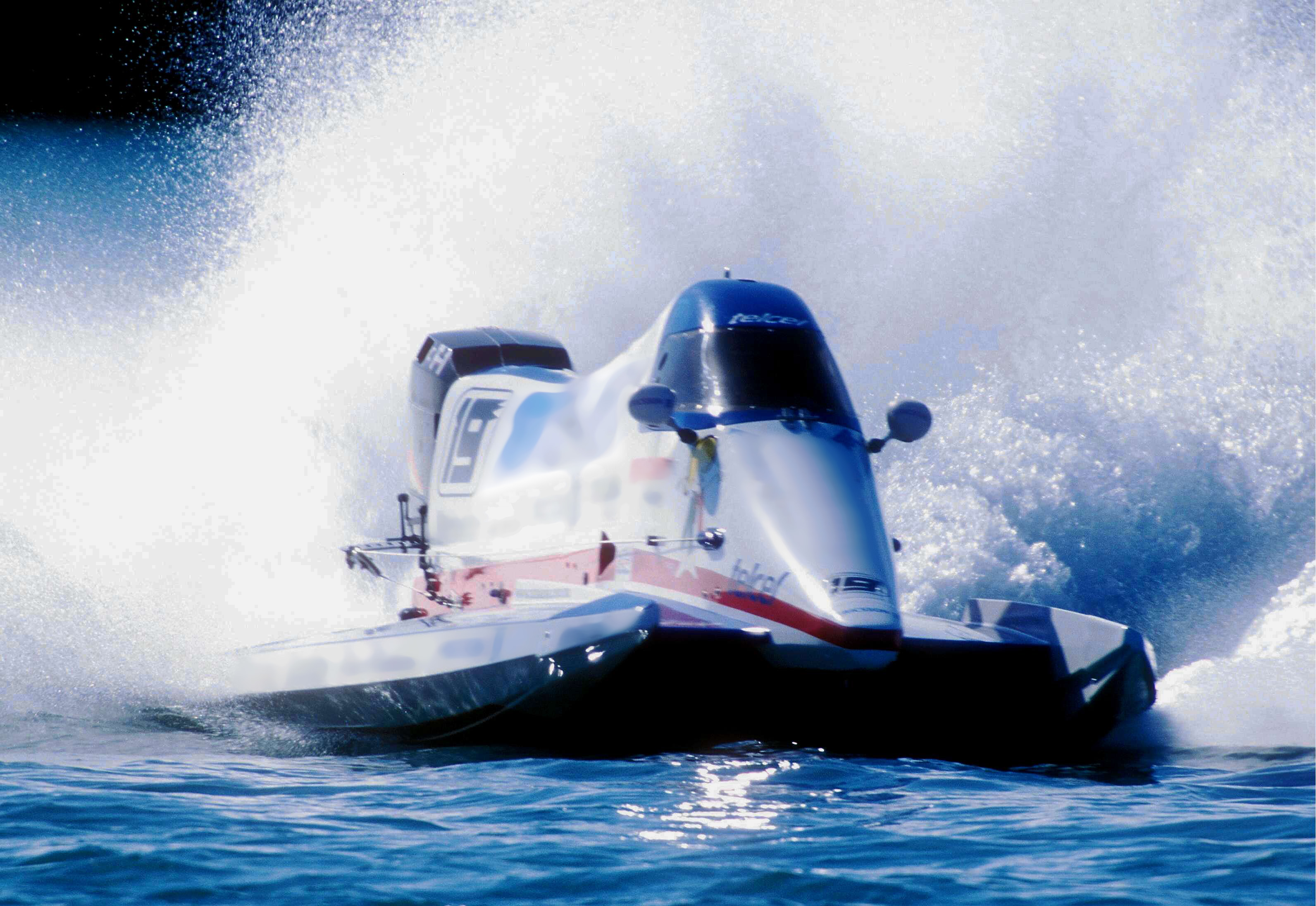 Carlos Kuri a toda velocidad (240 Km/h)